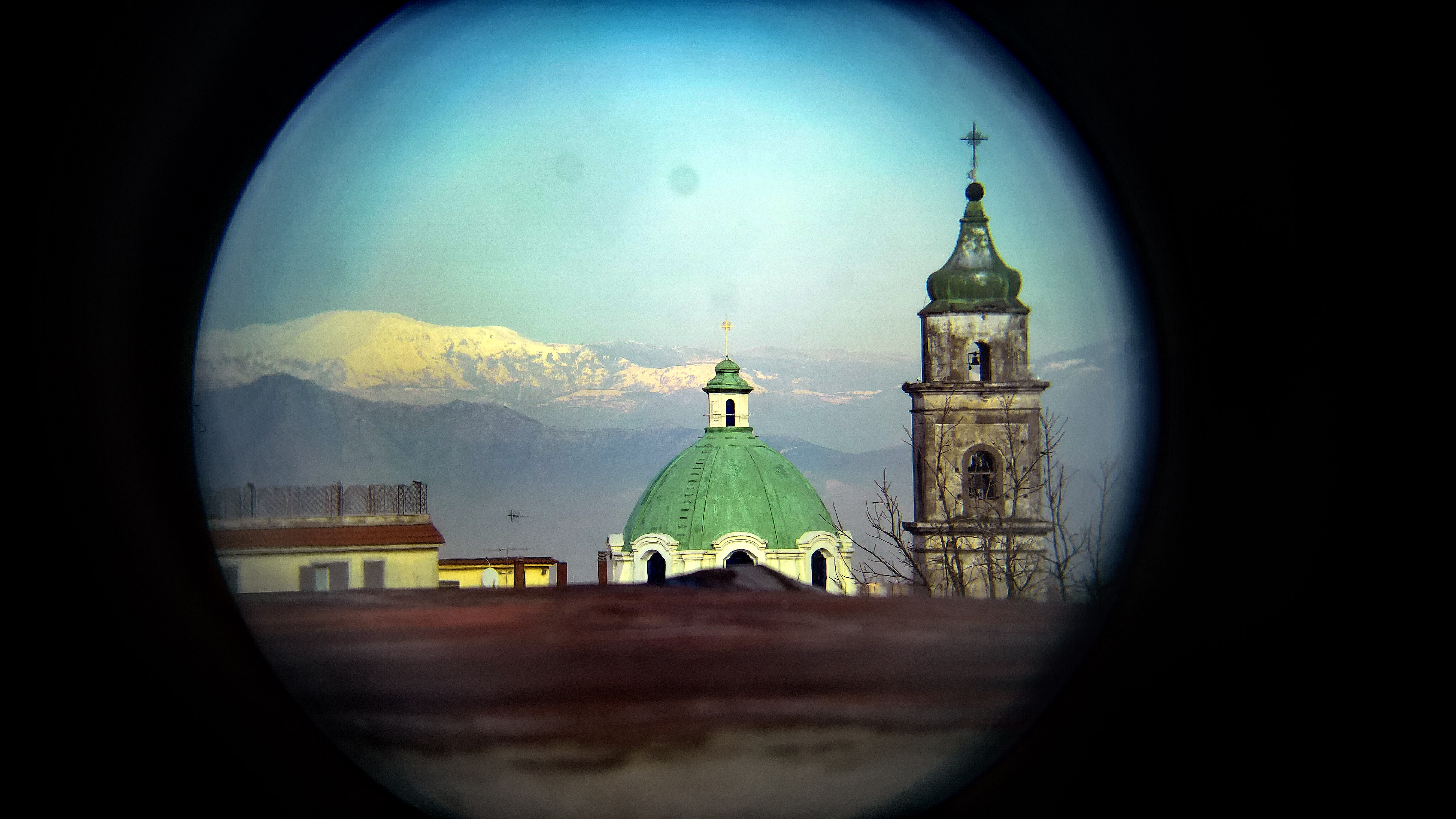 La Chiesa di Santa Maria delle Grazie ed il Campanile con sfondo il Matese innevato visti da Marano.